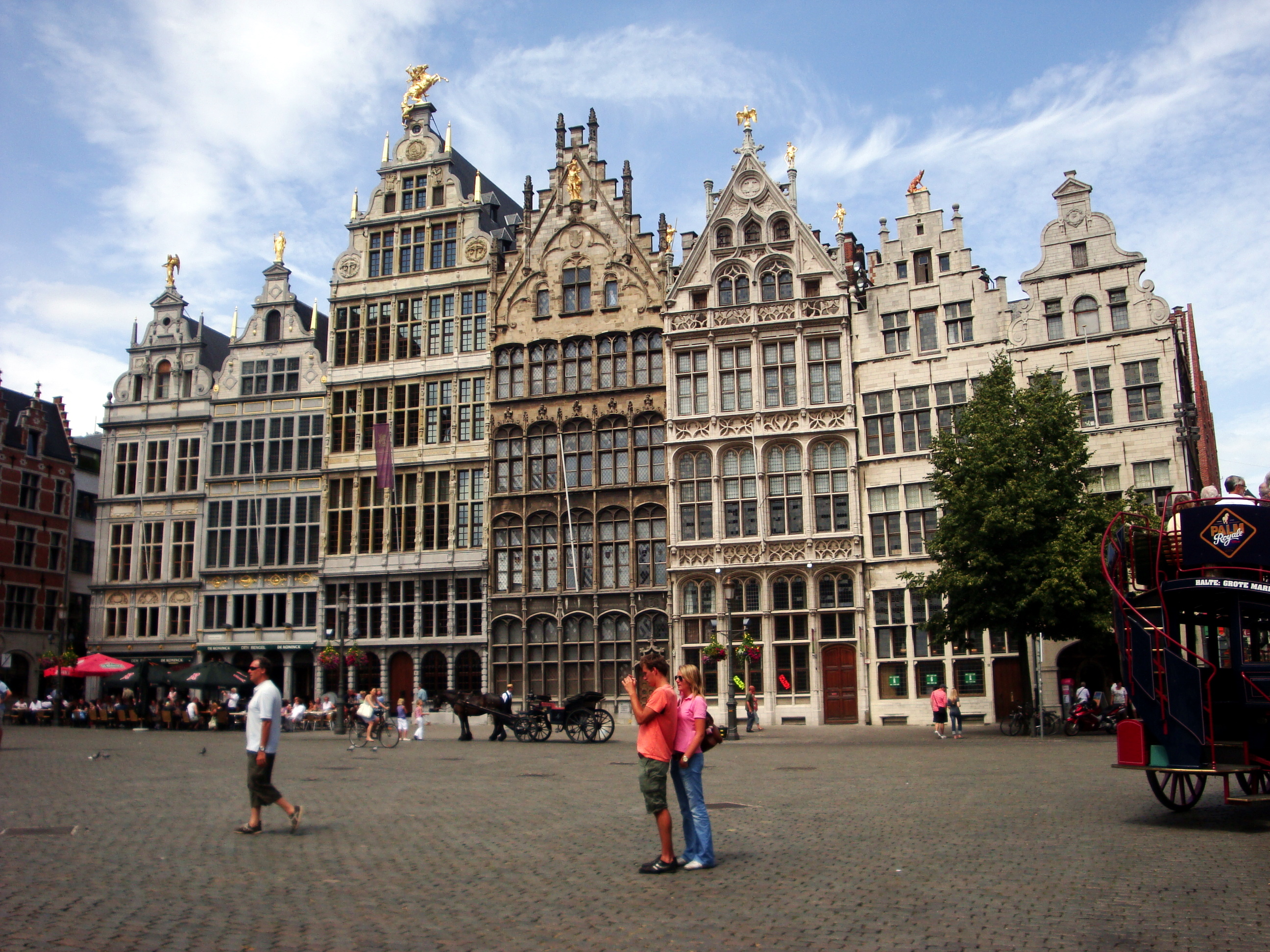 Grote Markt in Antwerpen, Belgium